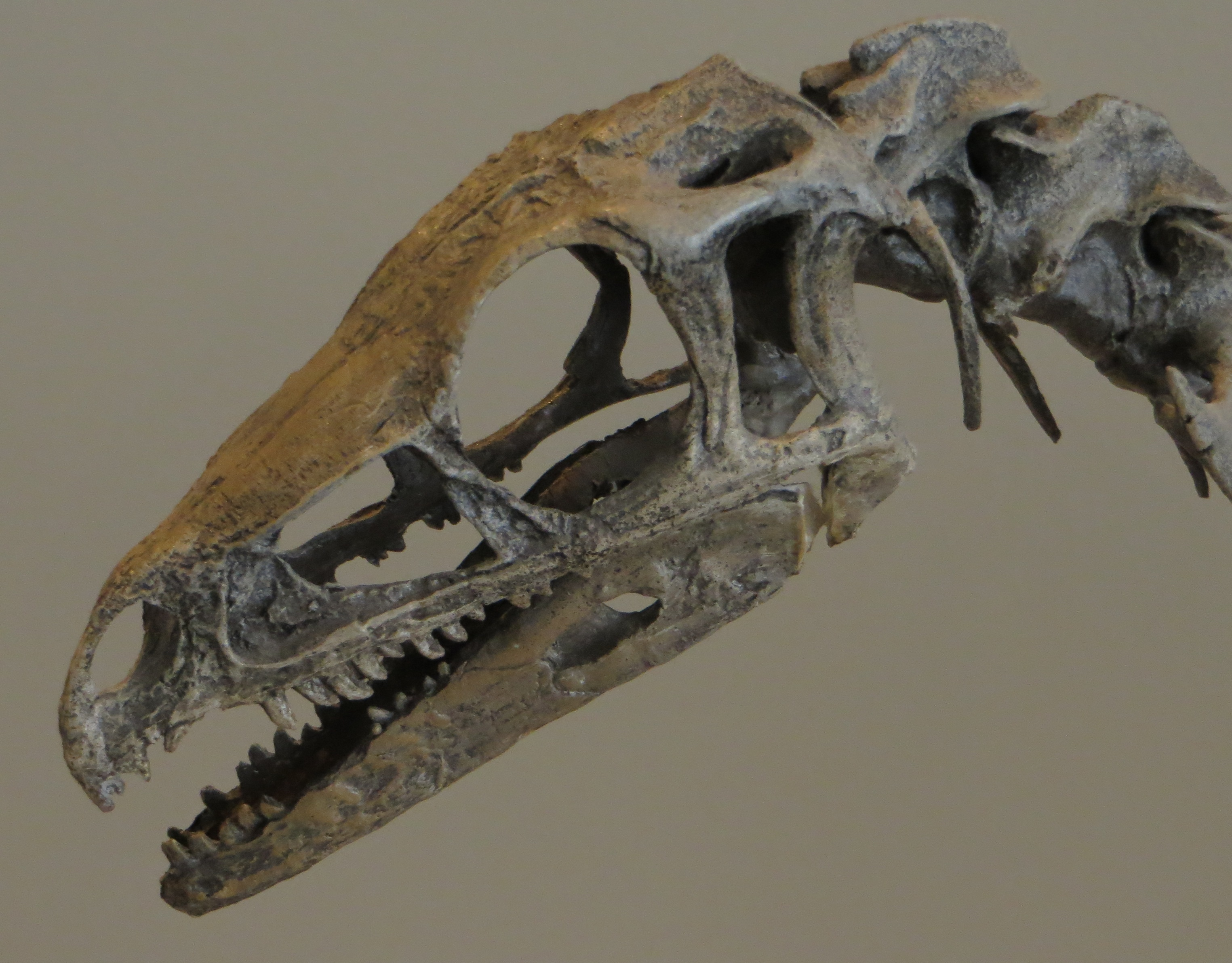 Fossil - Took The picture at Royal Belgian Institute of Natural Sciences, Brussels